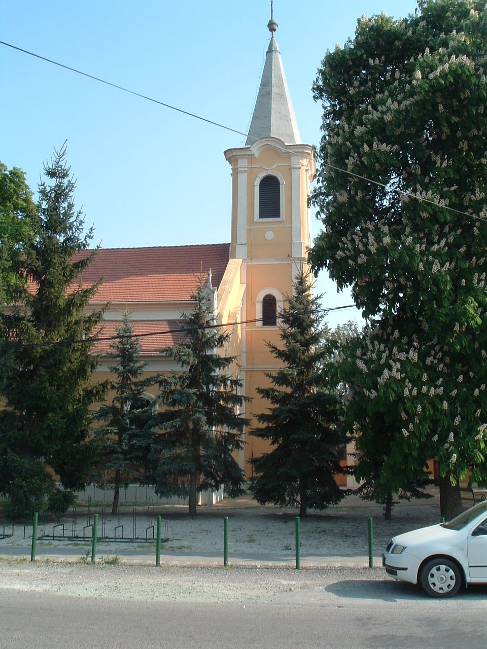 Gencsapáti, Church of Nagygencs, Szent Jakab-templom